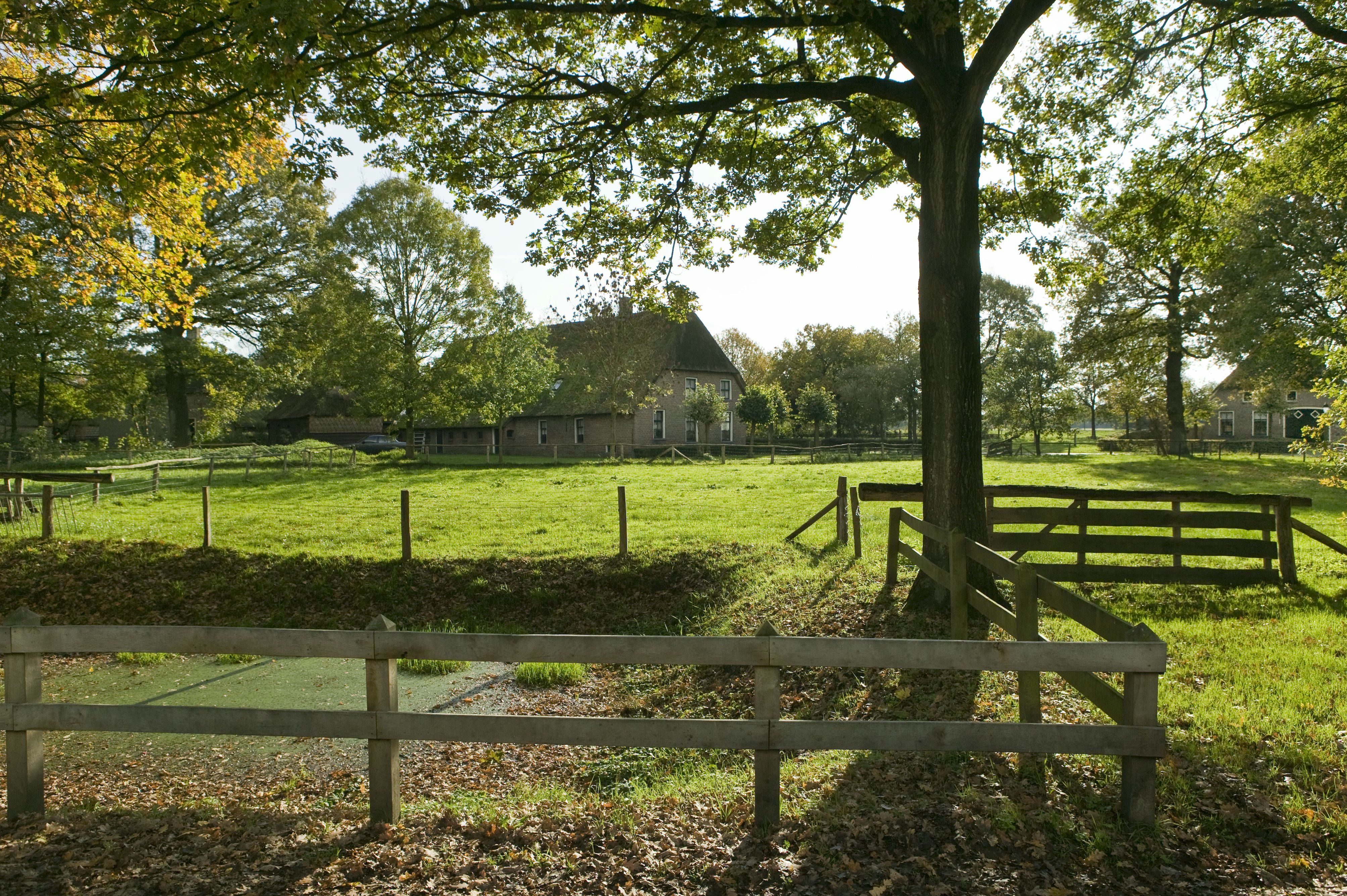 Ottenhoes: Overzicht van de boederij Ottenshoes met omgeving (opmerking: Gefotografeerd voor fotofolie nieuwbouw)